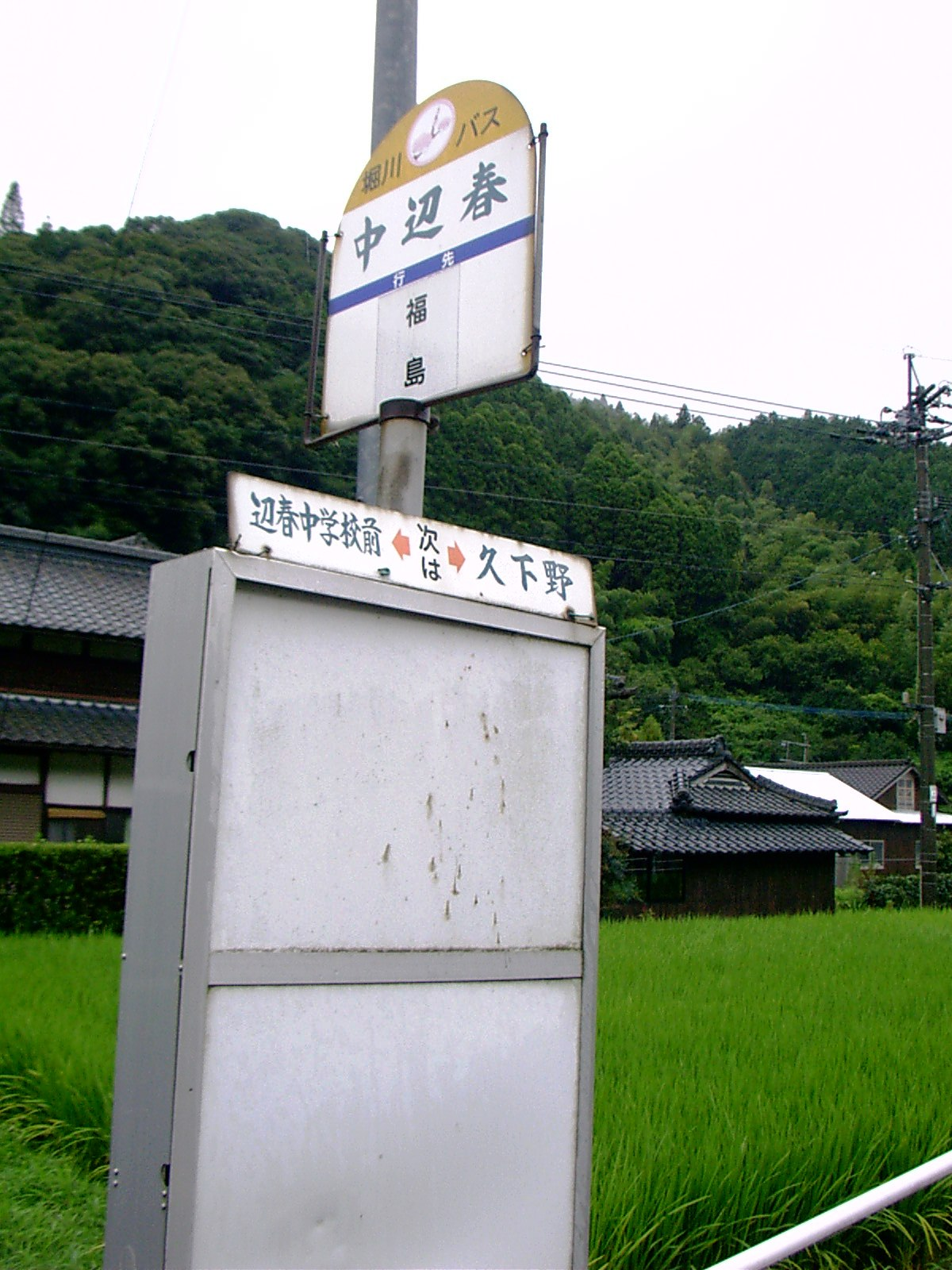 堀川バス 中辺春停留所